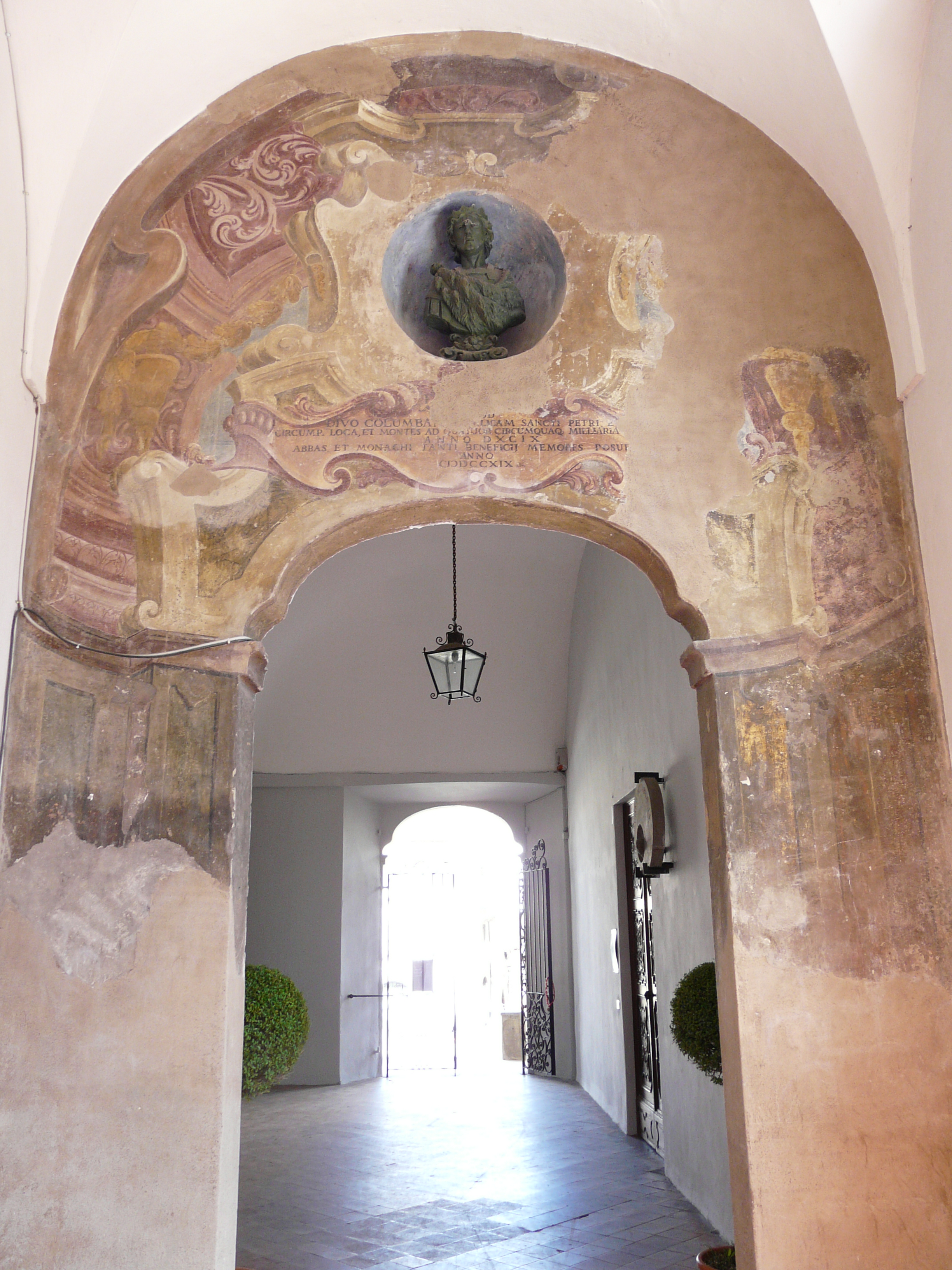 Immagini dell'abbazia di San Colombano di Bobbio, Emilia-Romagna, Italia